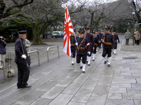 Veterans at Yasukuni Shrine